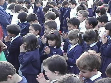 Actividades matutinas